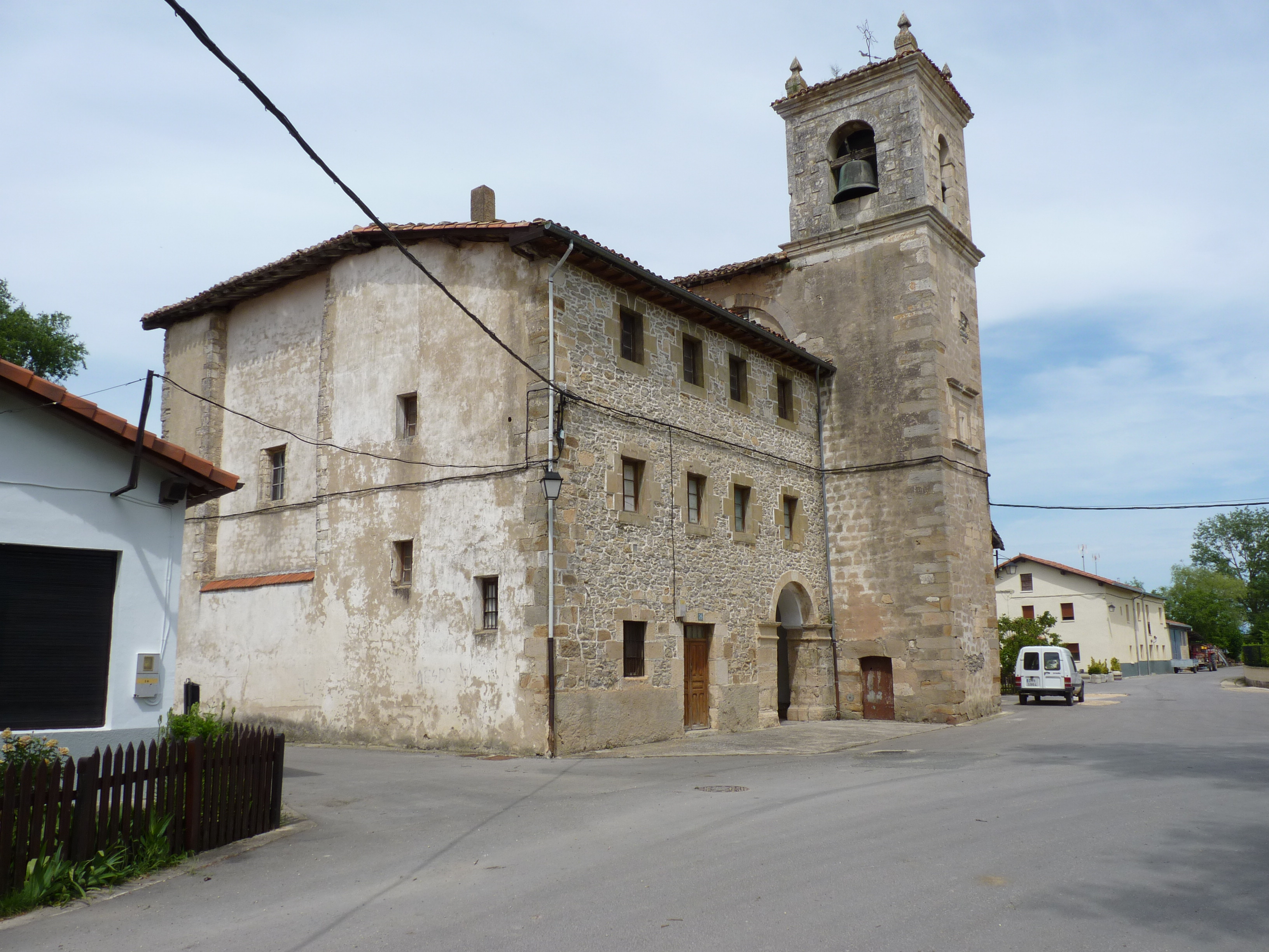 Exterior Iglesia San Roman Ezkerekotxa